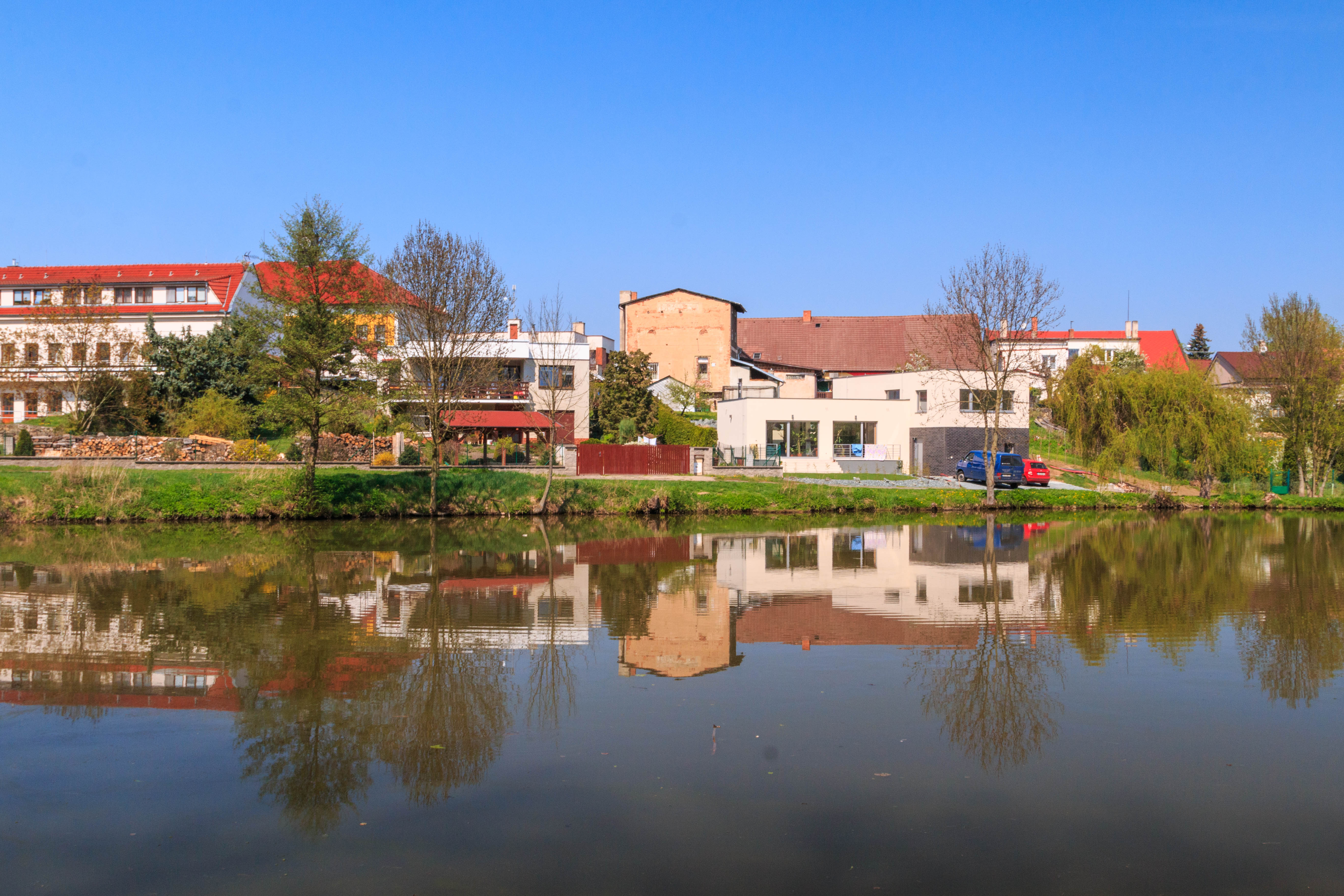 Rybník Řehák v Cholticích Project: Vodstvo.